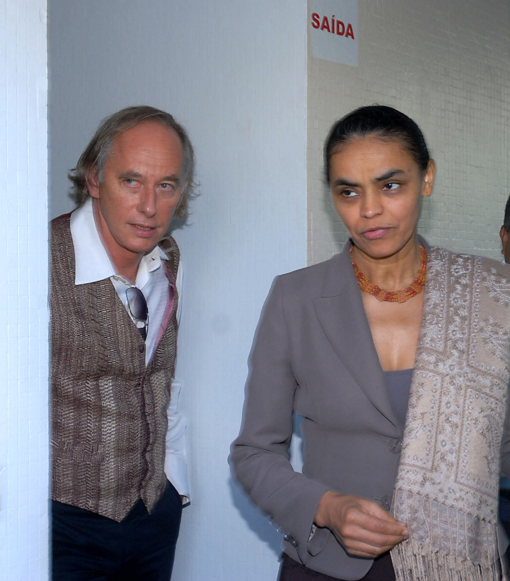 Ex-ministra do Meio Ambiente, Marina Silva, reuniu-se com seu provável substituto, Carlos Minc. Na saída, ele disse que seria impossível dar continuidade à agenda ambiental "sem conversar com a pessoa que há cinco anos e meio está conduzindo" o processo.